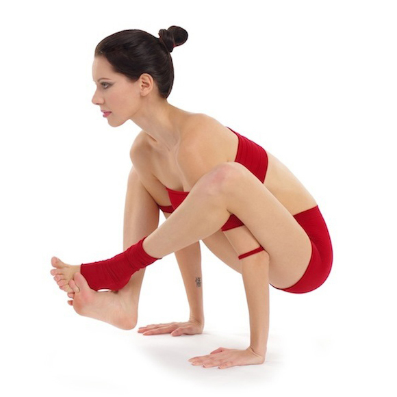 Bhujapidasana by Nina Mel, Yoga Teacher